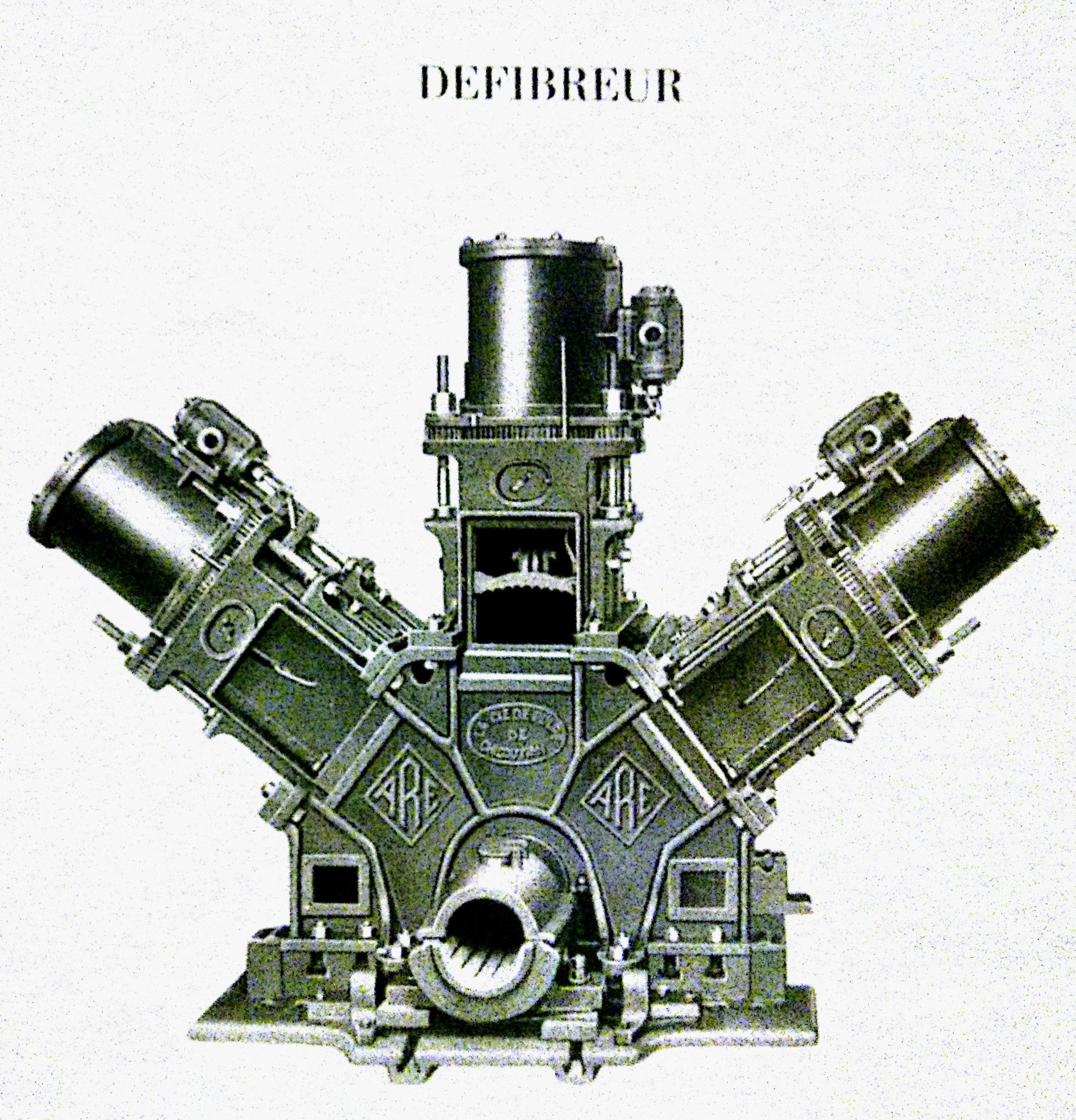 Dessin d'un défibreur dans le catalogue de la Compagnie de Pulpe de Chicoutimi. Collection de la Société historique du Saguenay.